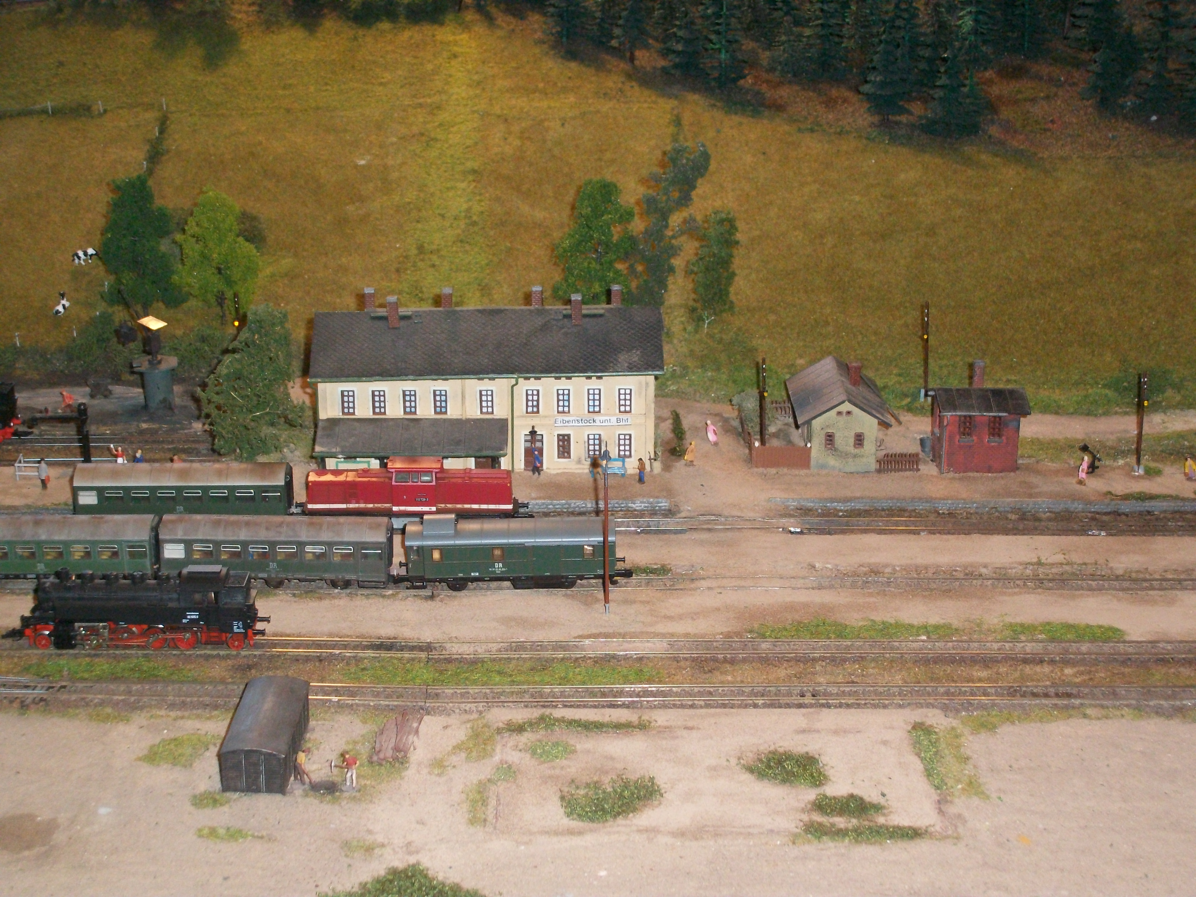 Miniatur Eibenstock unt Bf, Empfangsgebäude